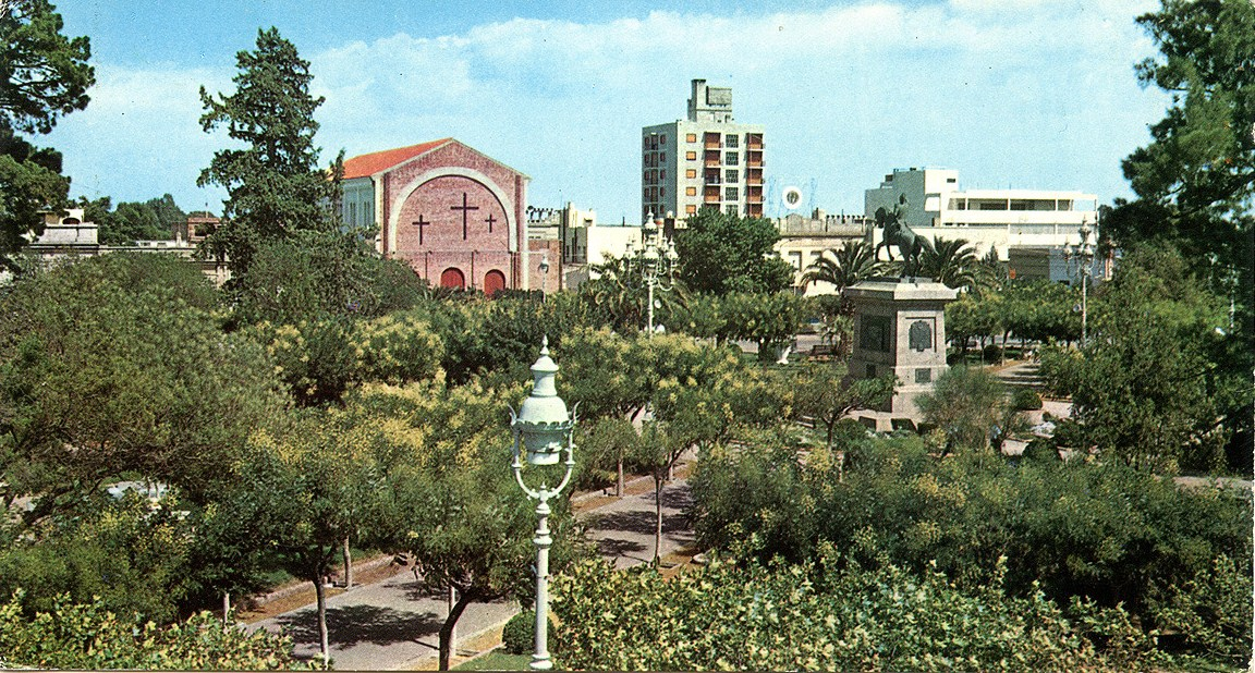 Plaza San Martín, Catedral de Santa Rosa con su fachada inconclusa, y al fondo el Edificio Vivona. Postal editada entre los años '60 y '70. FUENTE: Fototeca Bernardo Graff. Archivo Histórico Provincial "Prof. Fernando E. Aráoz" Santa Rosa, La Pampa – Argentina.